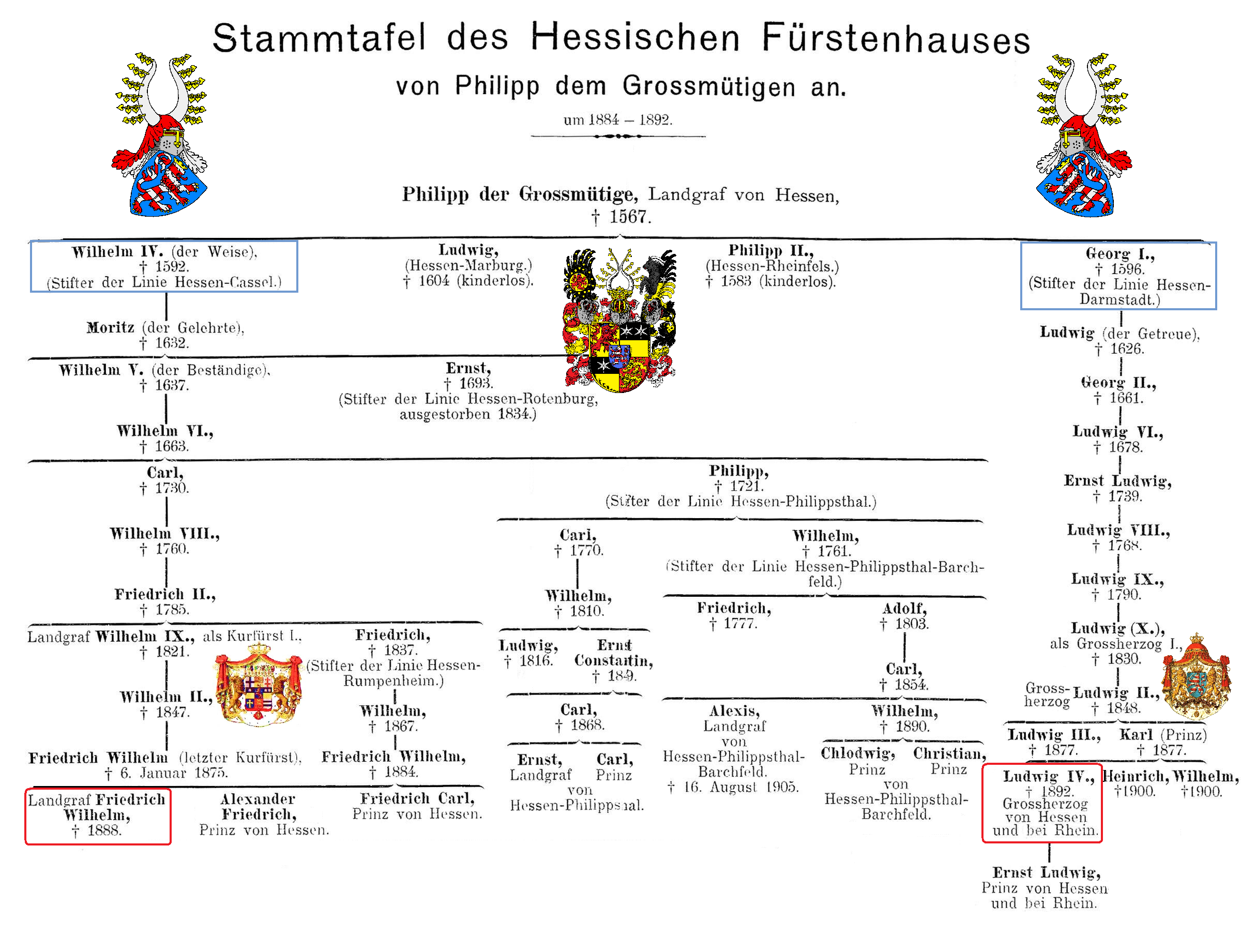 Stammtafel des Hessisches Fürstenhauses seit Philipp dem Großmütigen (Stand um 1884—1892); die Chefs der beiden Hauptlinien rot markiert (ältere= kurhessische und jüngere=großherzogliche Linie), die beide von Landgraf Philipp dem Großmütigen abstammen.